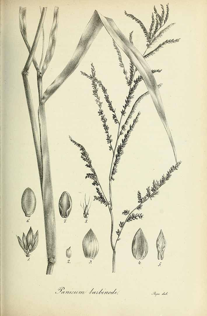 Brachiaria mutica (Forssk.) Stapf